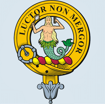 Емблема клану Глас